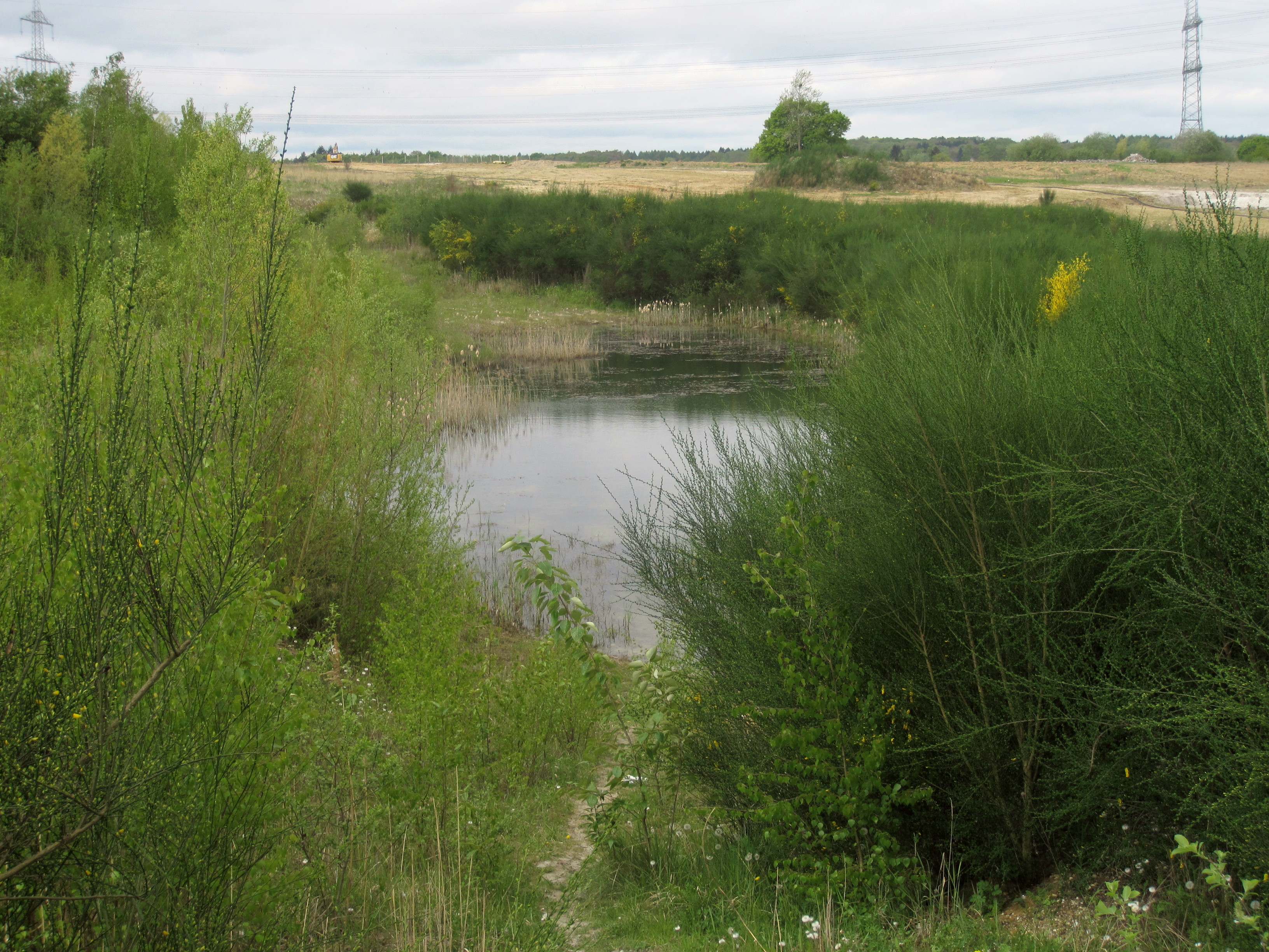 Grube 'Schenkenbusch', angrenzend an Naturschutzgebiet 'Tongrube Witterschlick'